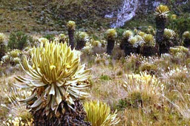 flora